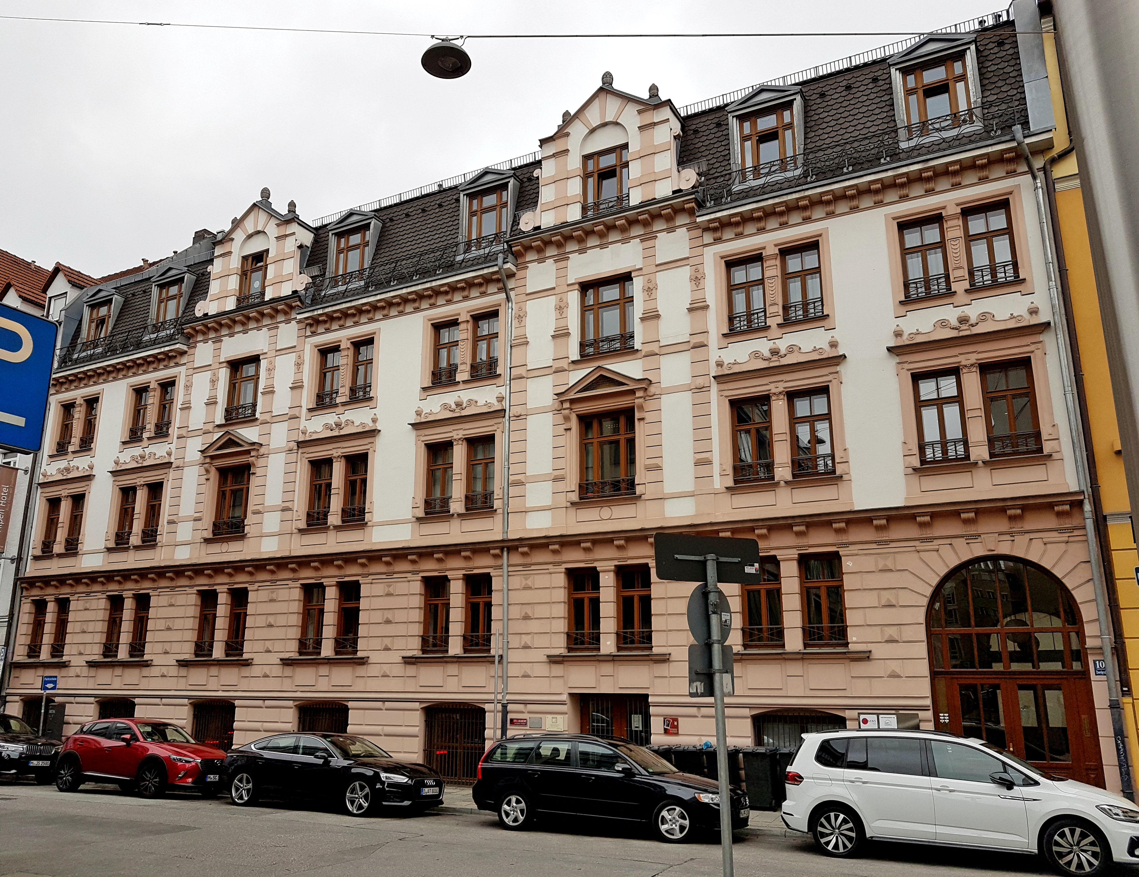 München-Ludwigsvorstadt, Zweigstrasse 10, ehemaliges Hotel Kronprinz.